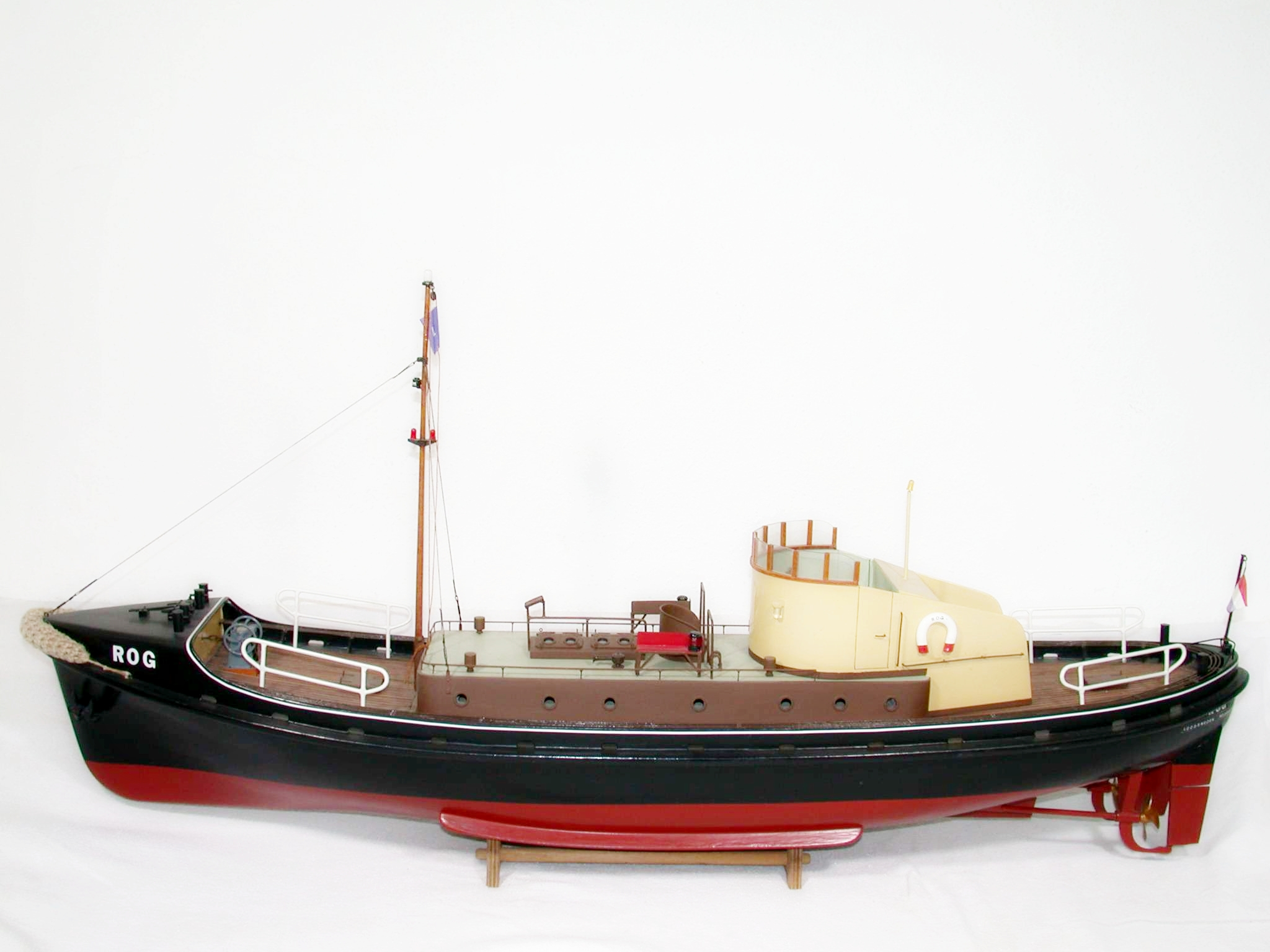 Nabootsing. Gebouwd rijkswerf Willemsoort (no. 26-1950); standplaats Vlissingen 1950 - 1980 afmetingen: 19,75 X 5,04 X 1,85 meter; 38 ton; 2 X 80 PK [Kromhoutmotor]; 10 mijl.